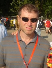 Roman Abramovic